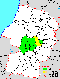 山形県西村山郡の位置。